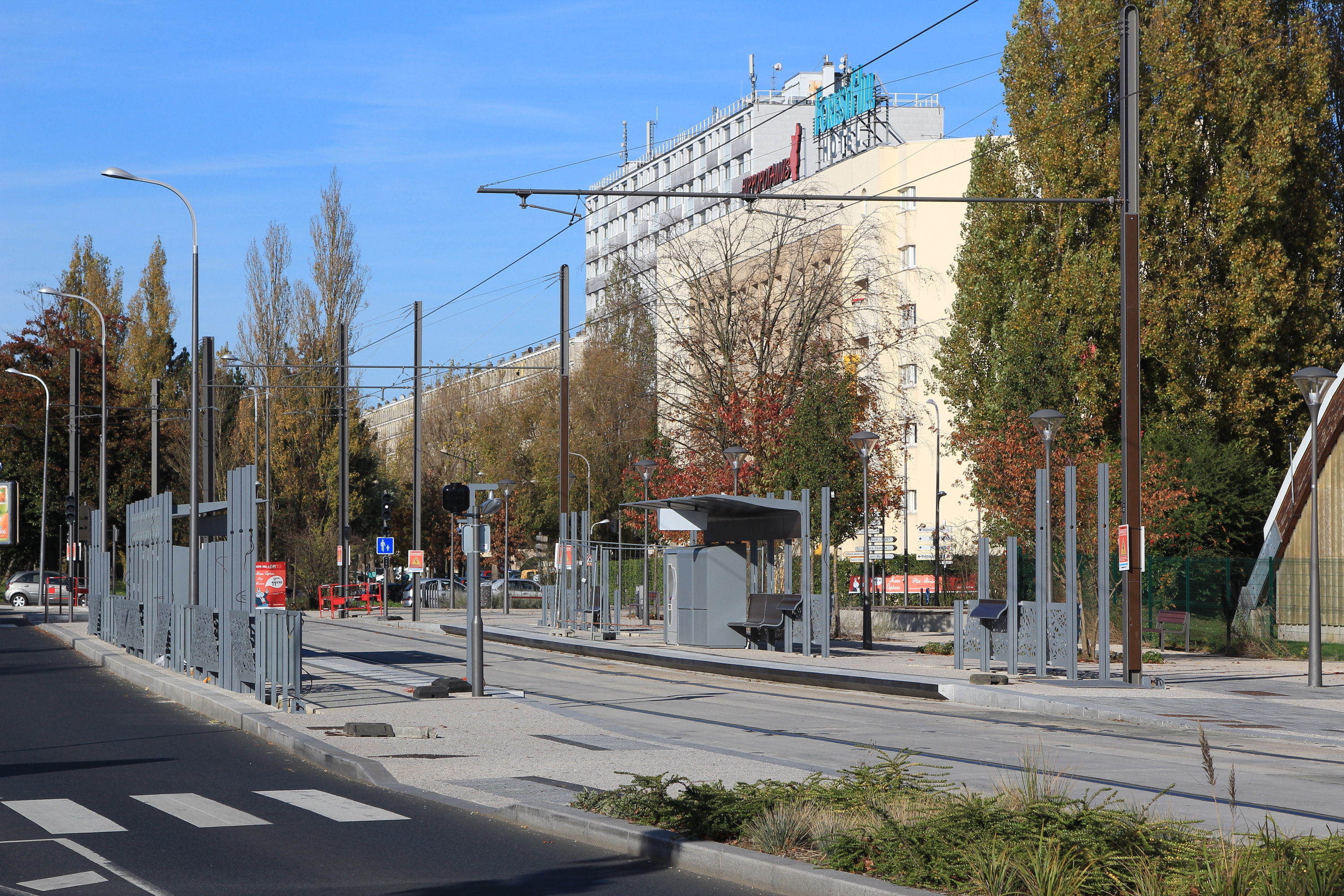 La station « Meudon-La-Forêt » du tramway T6 en Île-de-France.